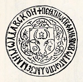 Печат на молдовския господар Стефан Велики (1457-1504)